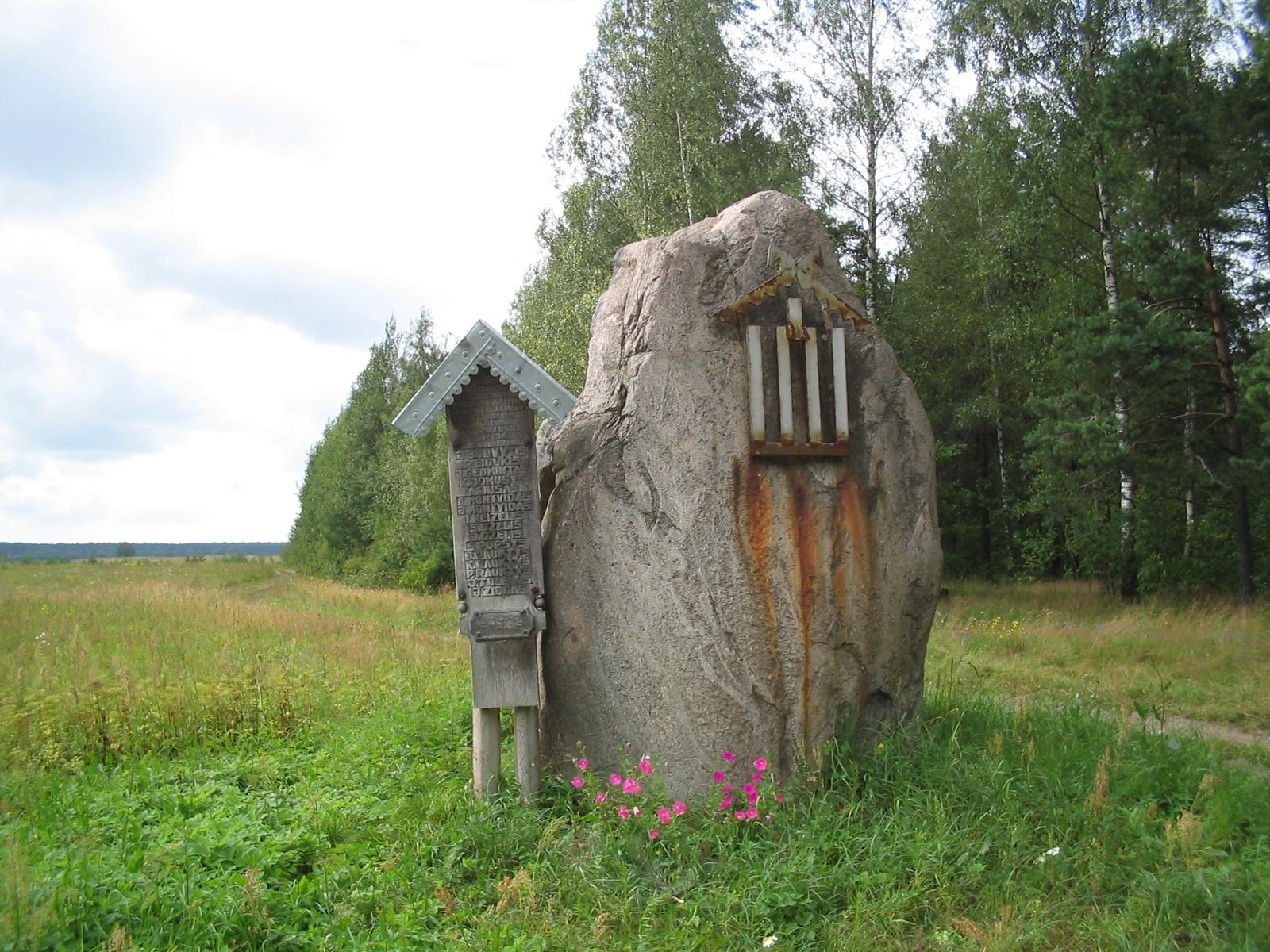 Pocių akmuo